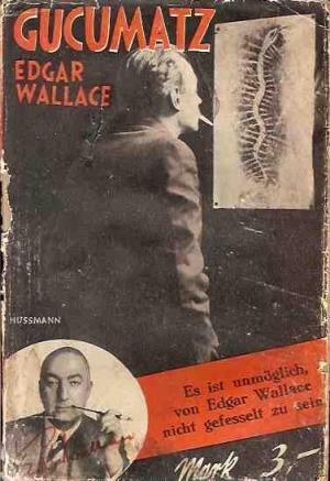 Edgar Wallace: Gucumatz. Goldmann Verlag Leipzig, ca 1930.